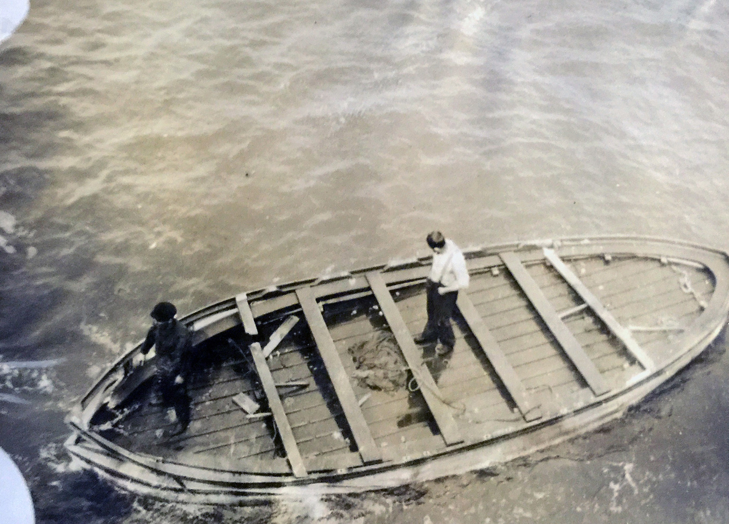 El bote plegable A del Titanic. Fue encontrado por tripulantes del RMS Oceanic el 13 de mayo de 1912, a 200 millas del lugar del naufragio y con 3 cadáveres dentro.